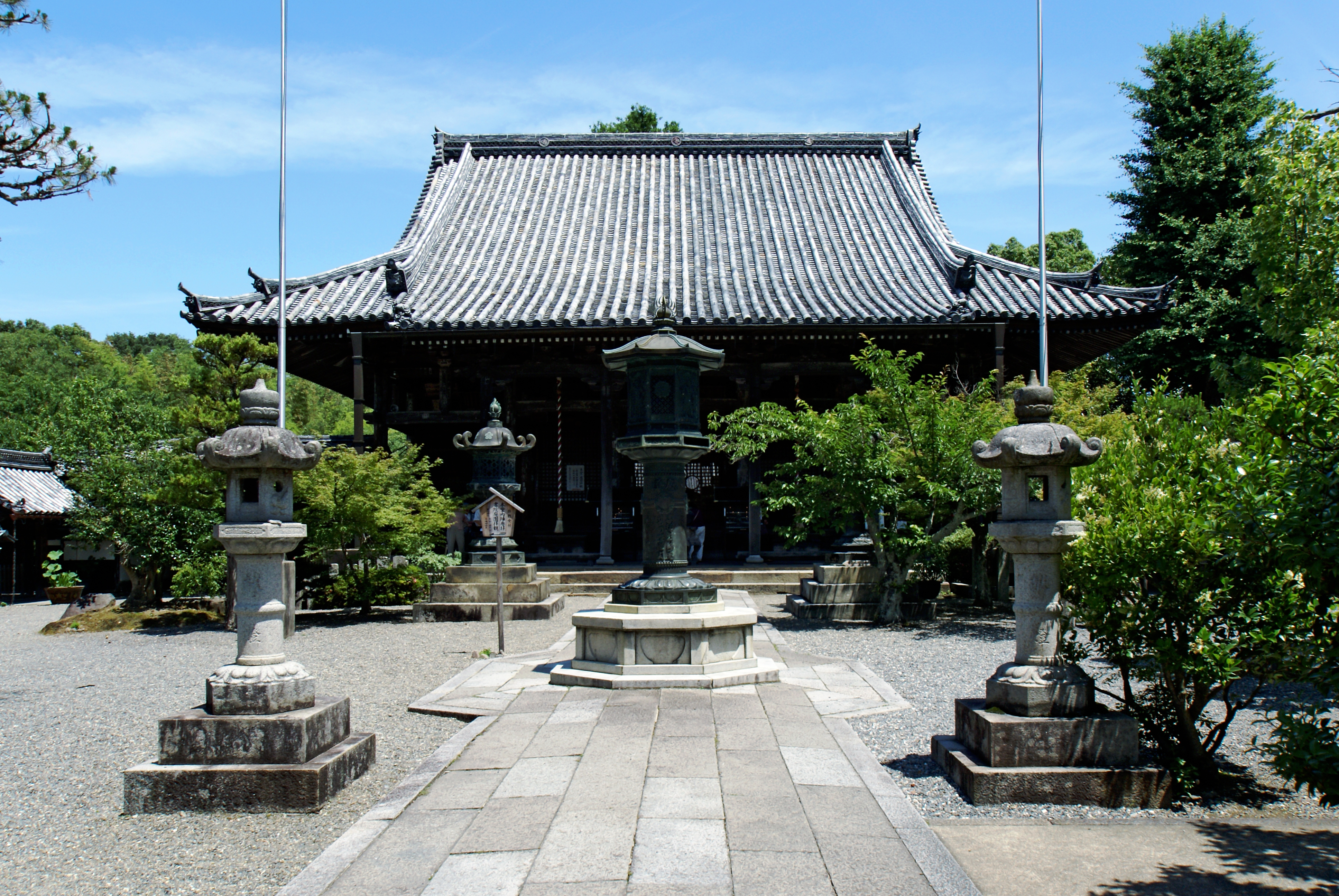 Anaoji in Kameoka, Kyoto prefecture, Japan